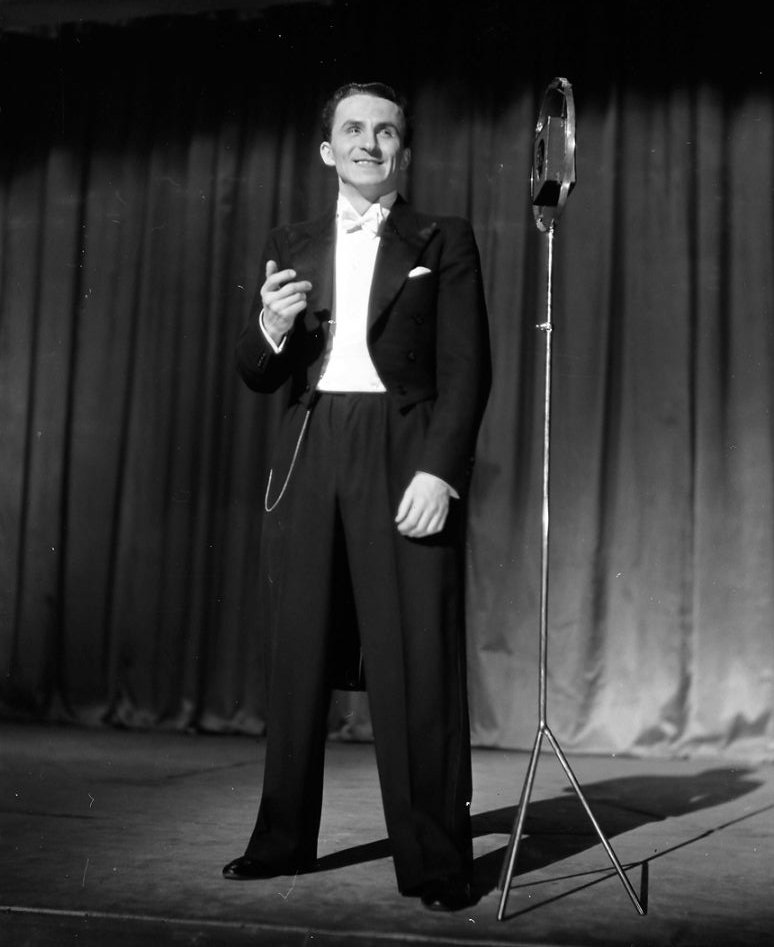 Kabarett der Komiker: Kurt Pratsch-Kaufmann parodiert Sänger